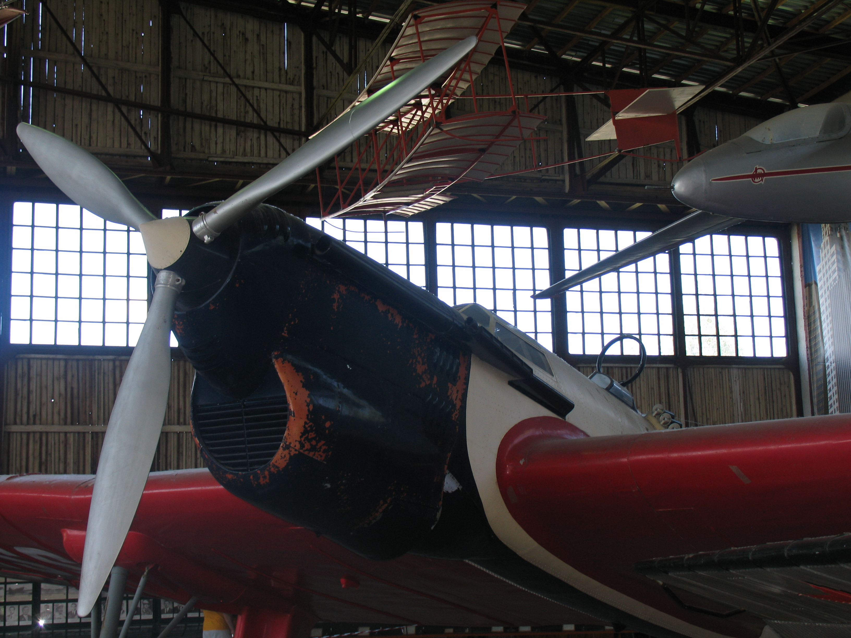 Носовая часть АНТ-25.